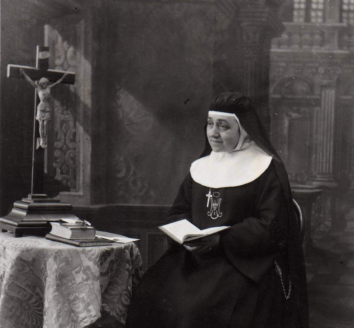 Celia Méndez y Delgado (1844-1908), fundadora de la Congregación de las Esclavas del Divino Corazón.